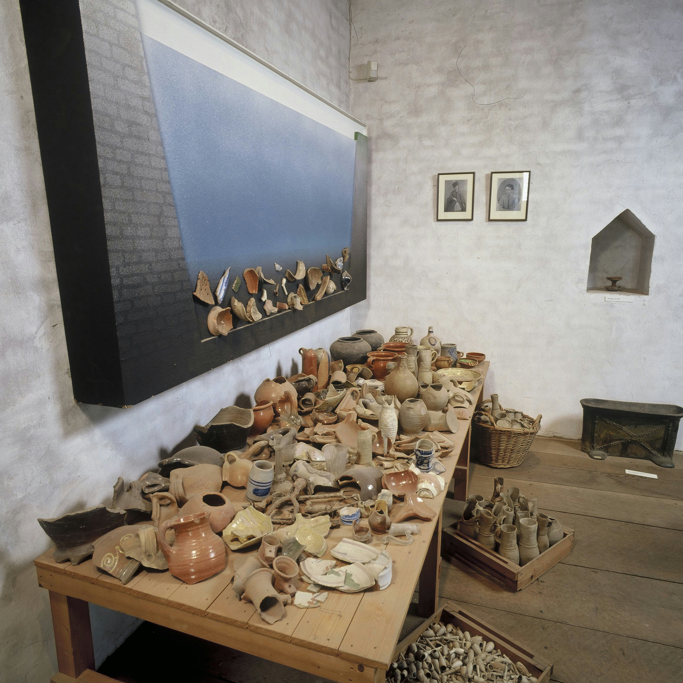 Kasteel Ammersoyen: Interieur, overzicht van museamzaal op zolderverdieping; opstelling archeologische collectie grachtvondsten (opmerking: Gefotografeerd voor het boek "Geldersche Kasteelen" door J.C. Bierens de Haan en J.R. Jas)